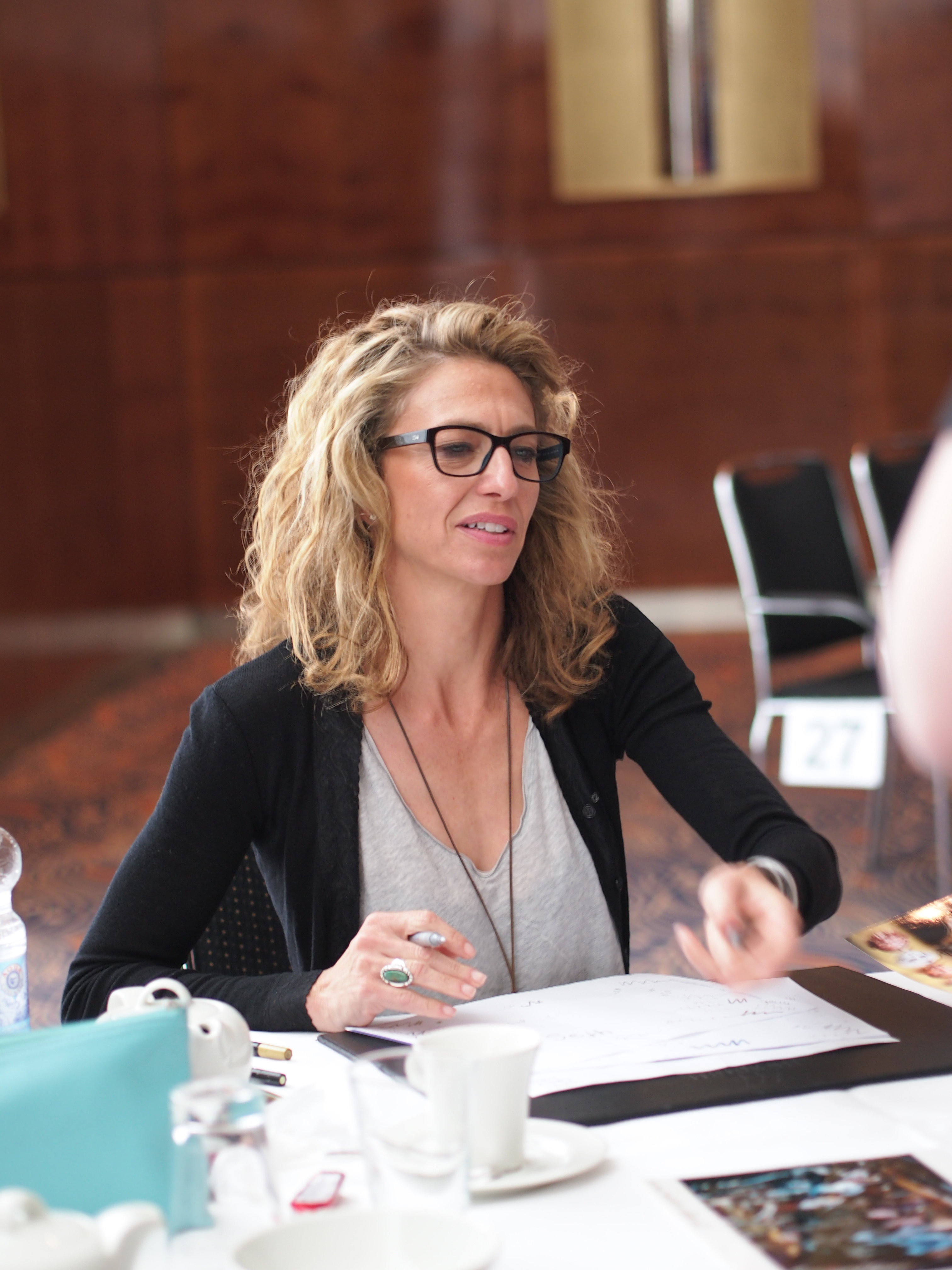 Claudia Black